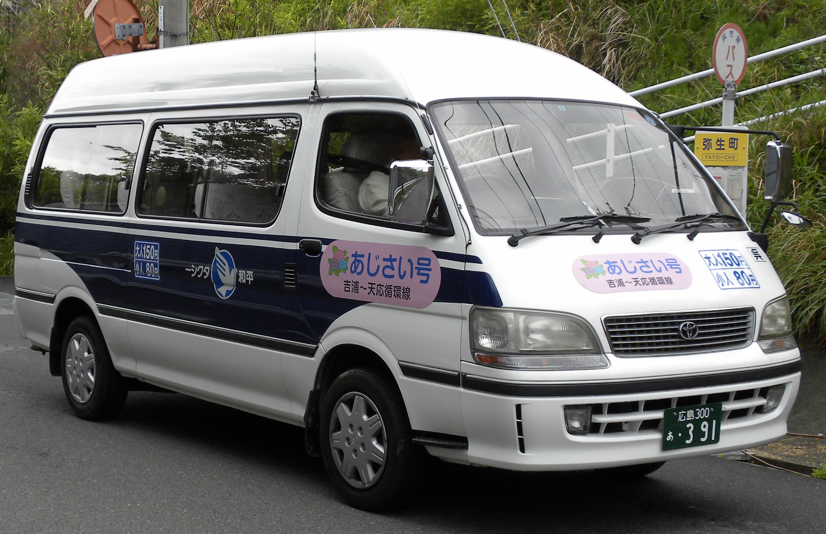 平和タクシー（広島県呉市） 吉浦地区乗合タクシー「あじさい号」の車両